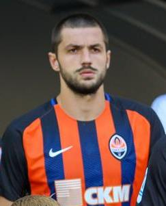 Давіт Хочолава - грузинський футболіст, захисник.